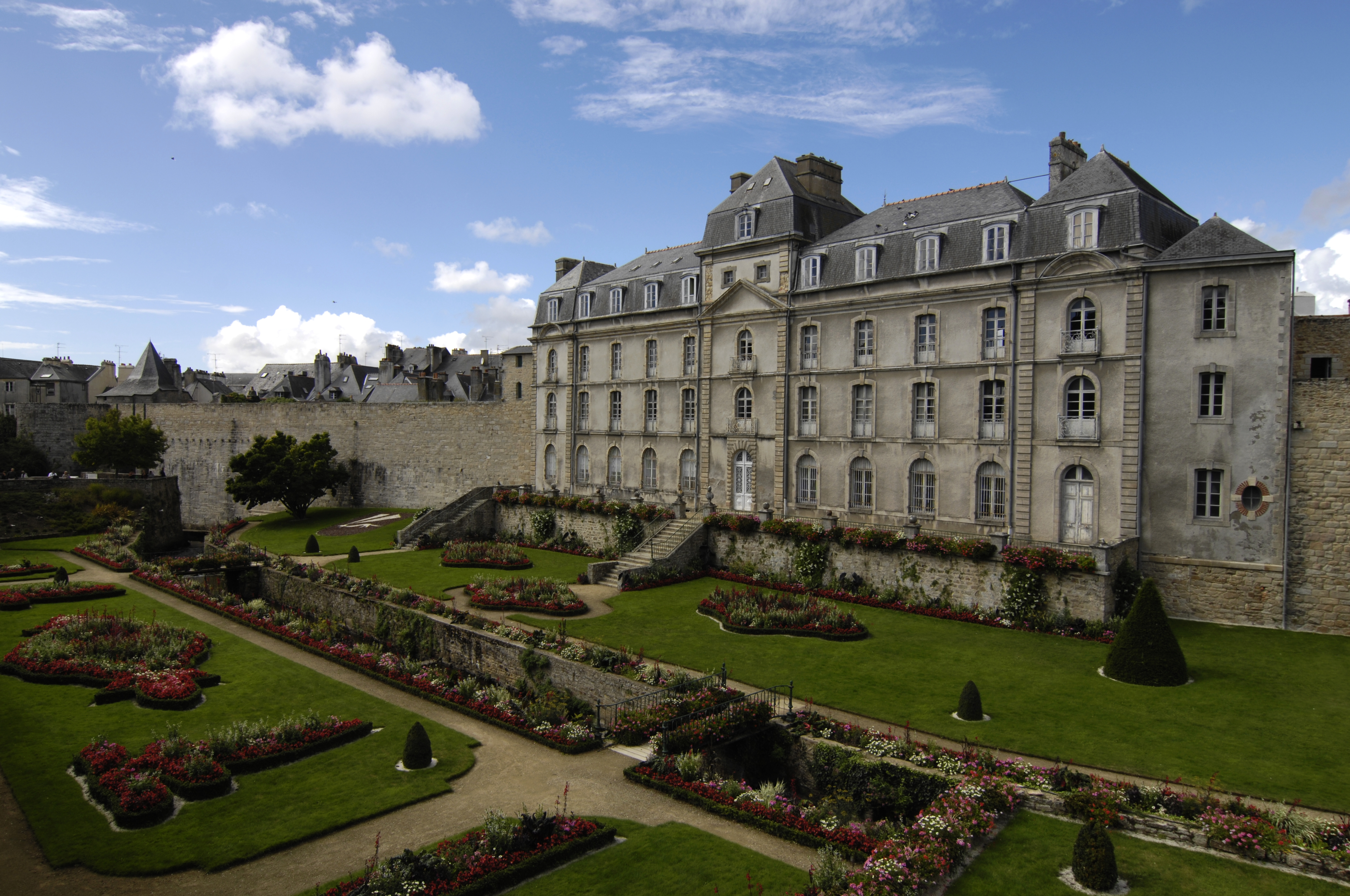 Vannes, Morbihan, Schloss